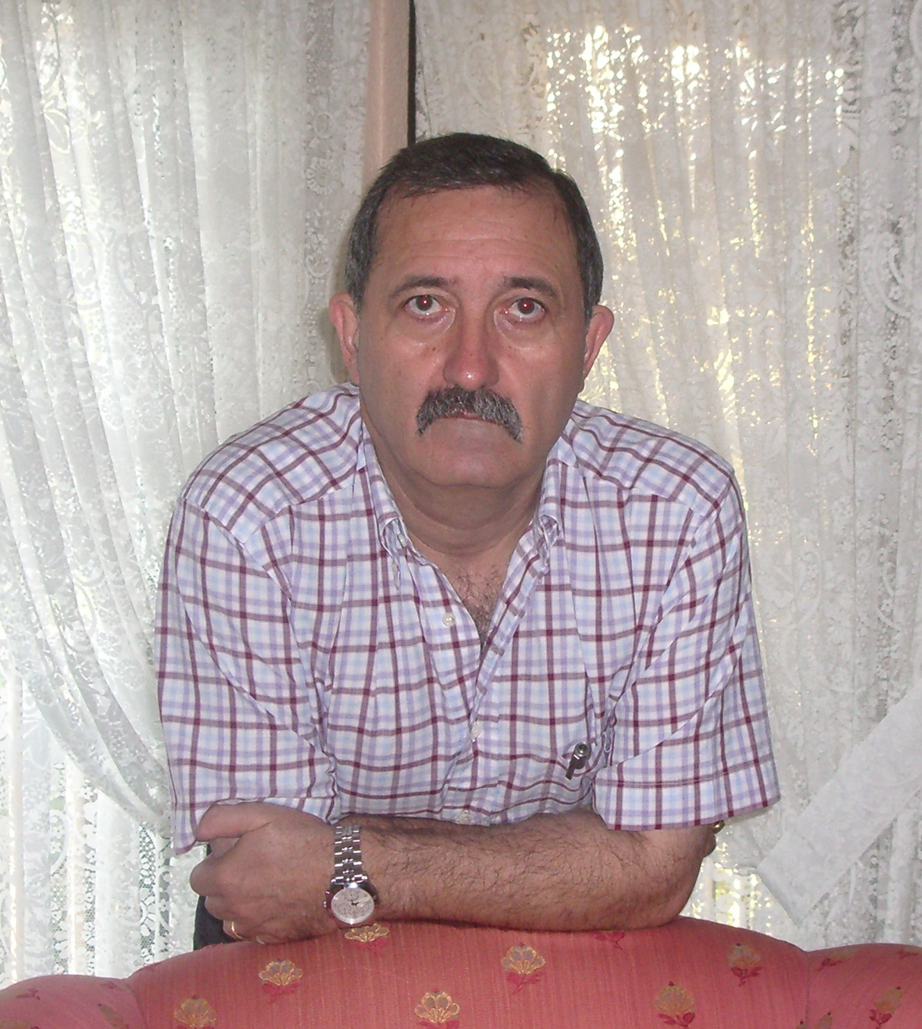 Fotografía de Julio Calvo